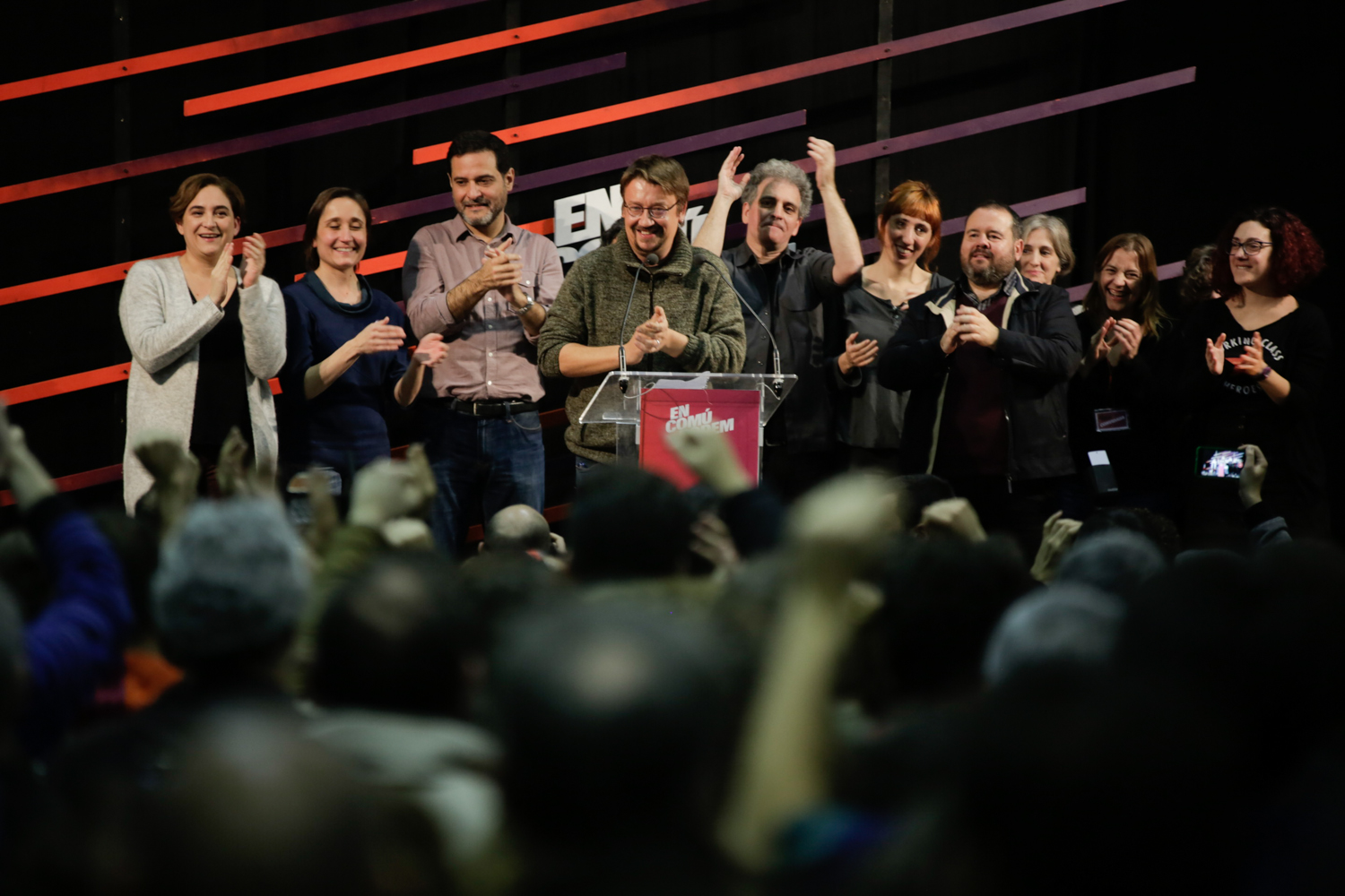 Estació del Nord, Barcelona 20/12/2015 Foto; Georgie Uris Nit electoral eleccions generals espanyoles 20 de desembre 2015. Àlbum d'En Comú Podem